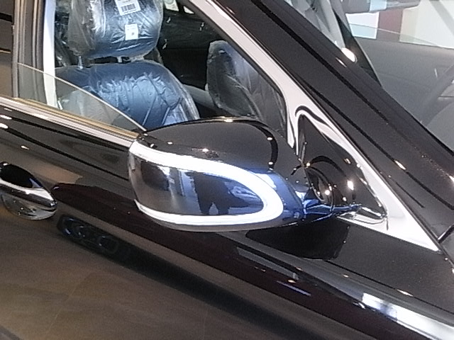 キア・K9